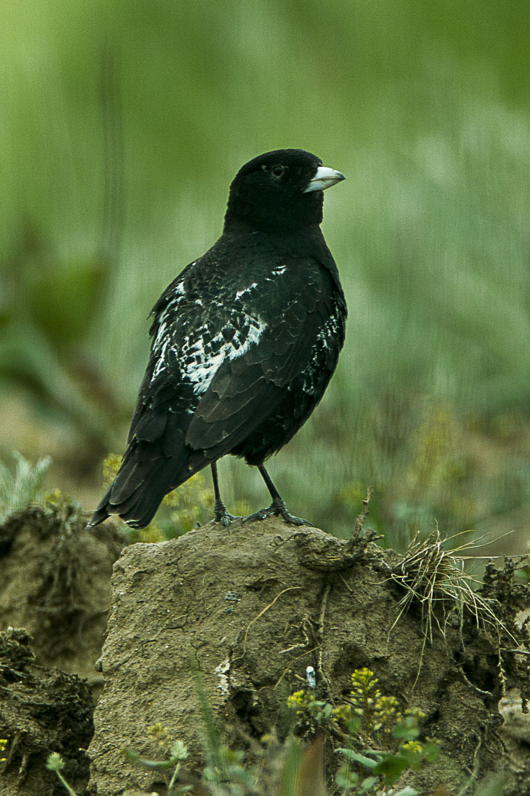 Black Lark - Kazakistan_S4E9836